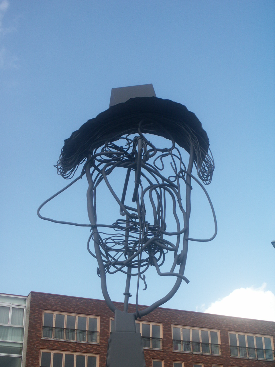 Anton Martineau - Kop met vier Neuzen (2008)